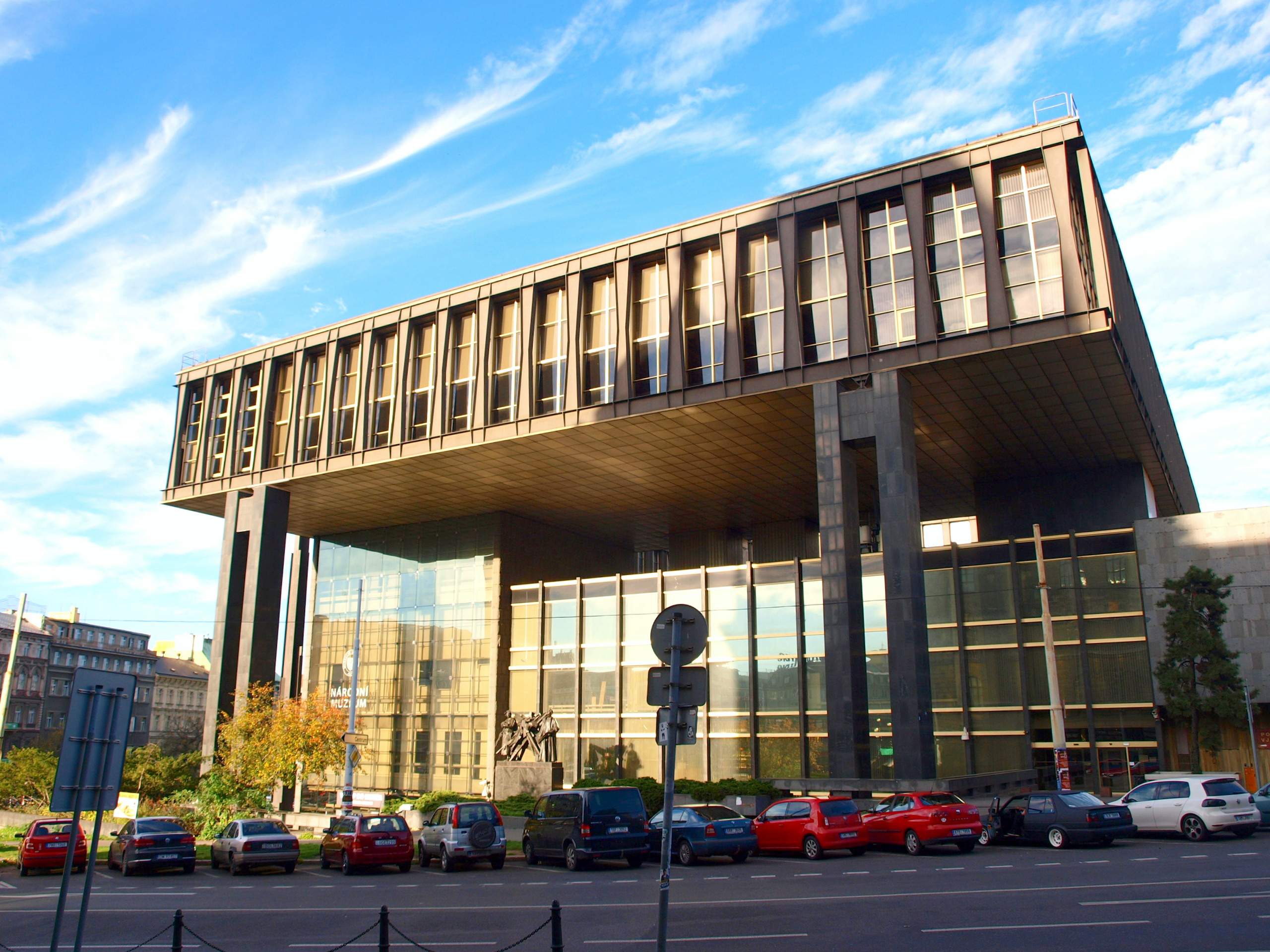 Národní muzeum